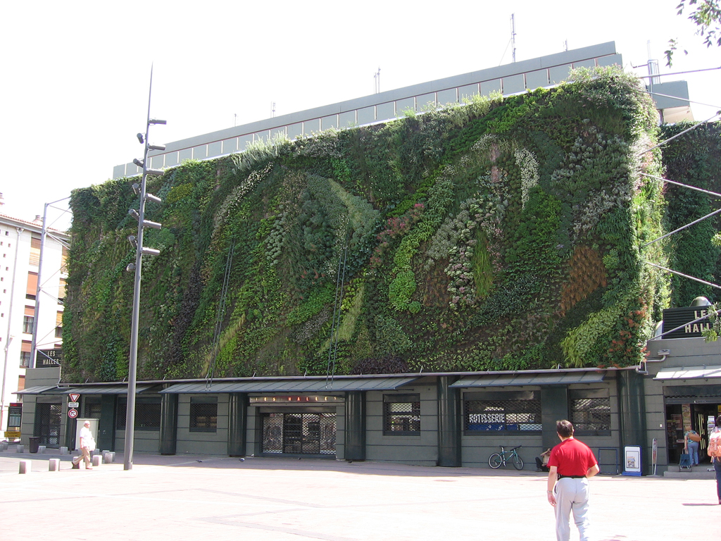 Mur végétal de 600m² installé sur la facade des Halles à Avignon (place Pie) conçu par le botaniste Patrick Blanc. Photo personnelle, diffusion illimitée. Juillet 2006